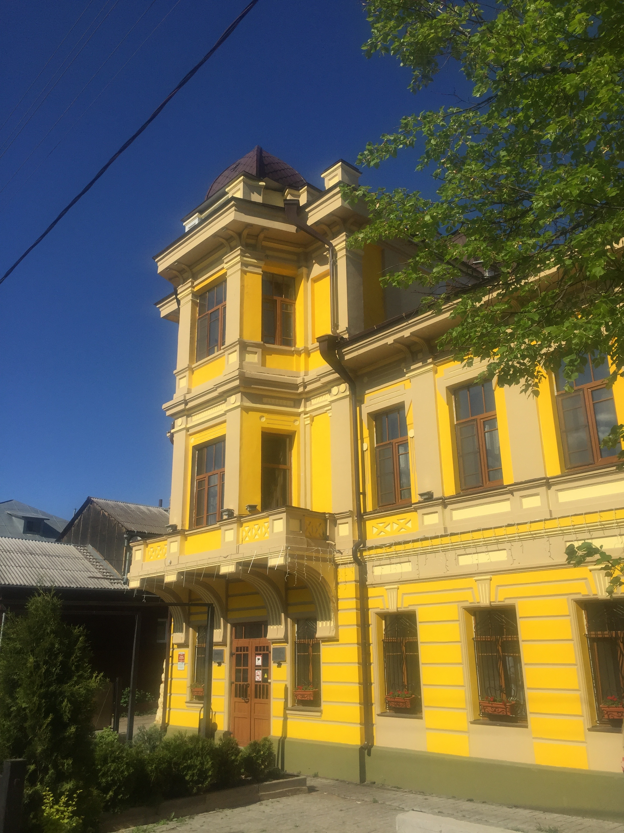 Отель и ресторан "Селивановъ"